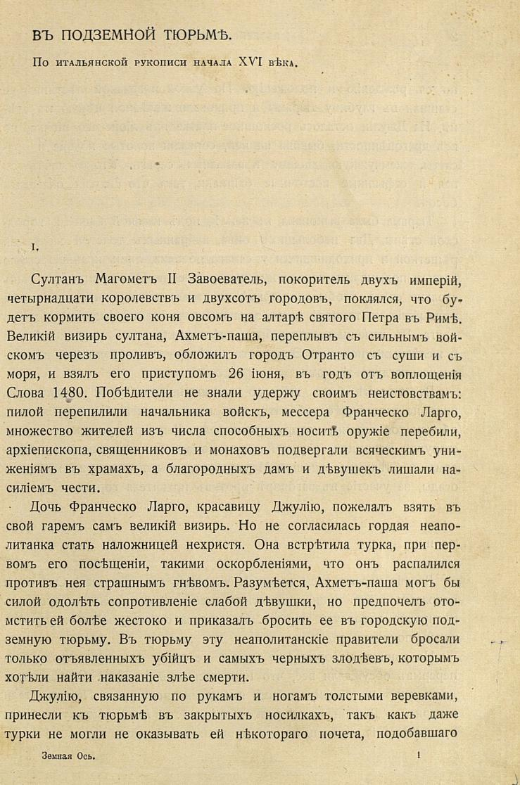 Zemnaya os, page 1